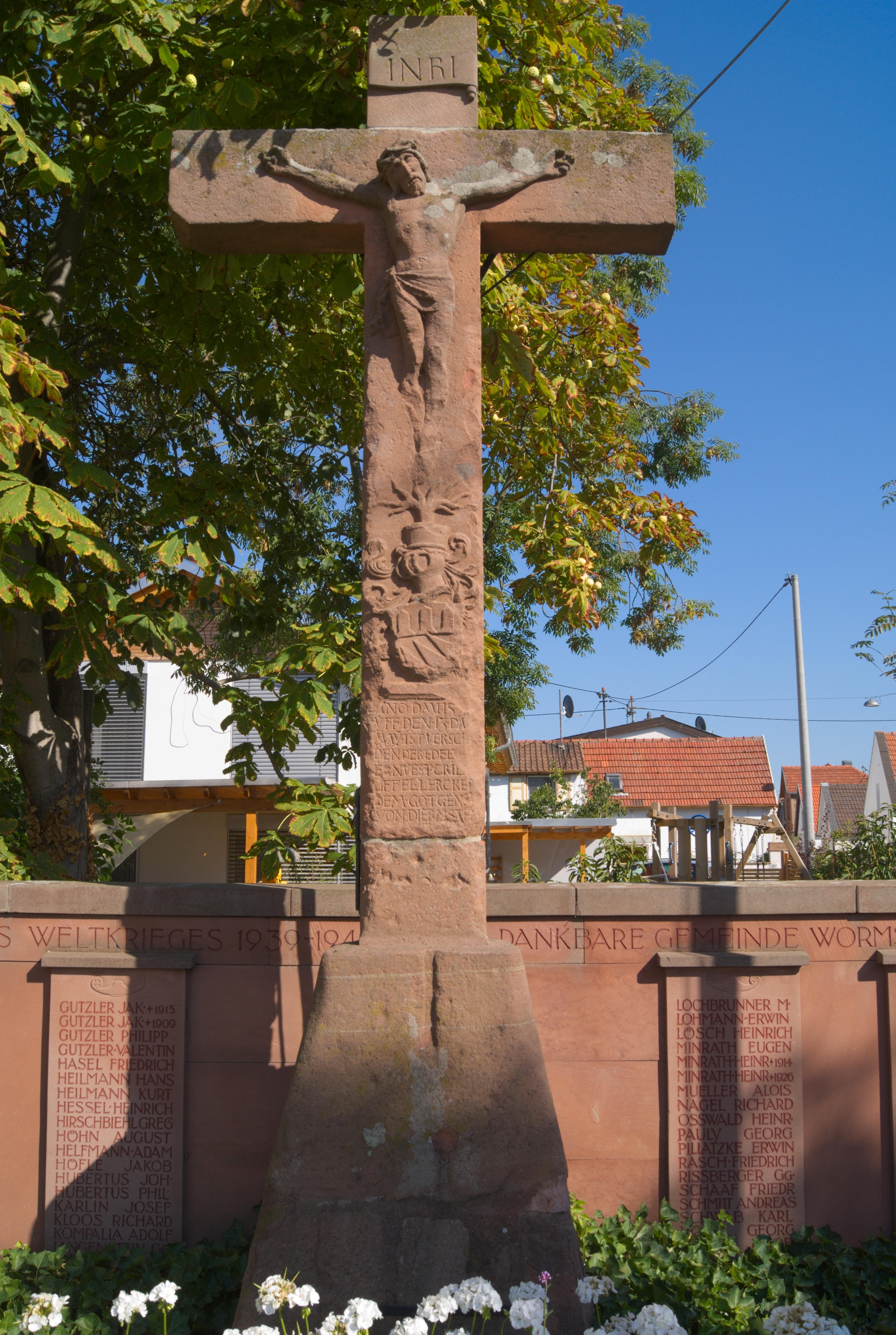 Worms-Weinsheim: Gedächtniskreuz Sandstein, 1582 (vor) Weinsheimer Hauptstraße 59)